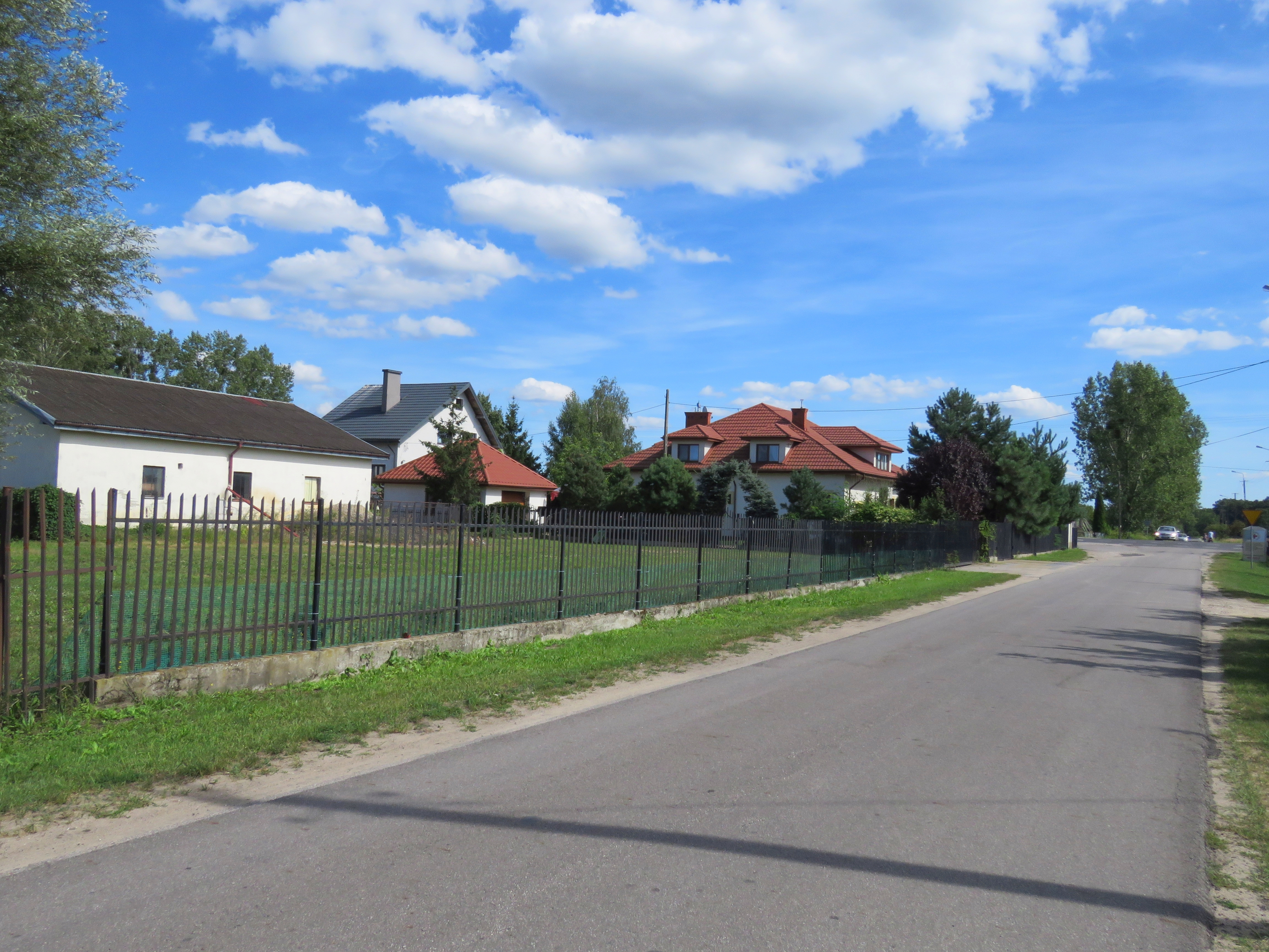 NOWE GNIEWGNIEWICE